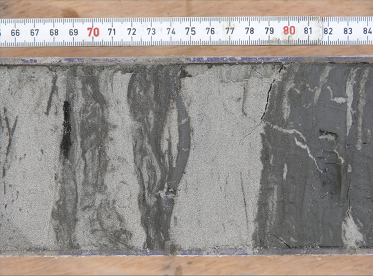 Kernprobe